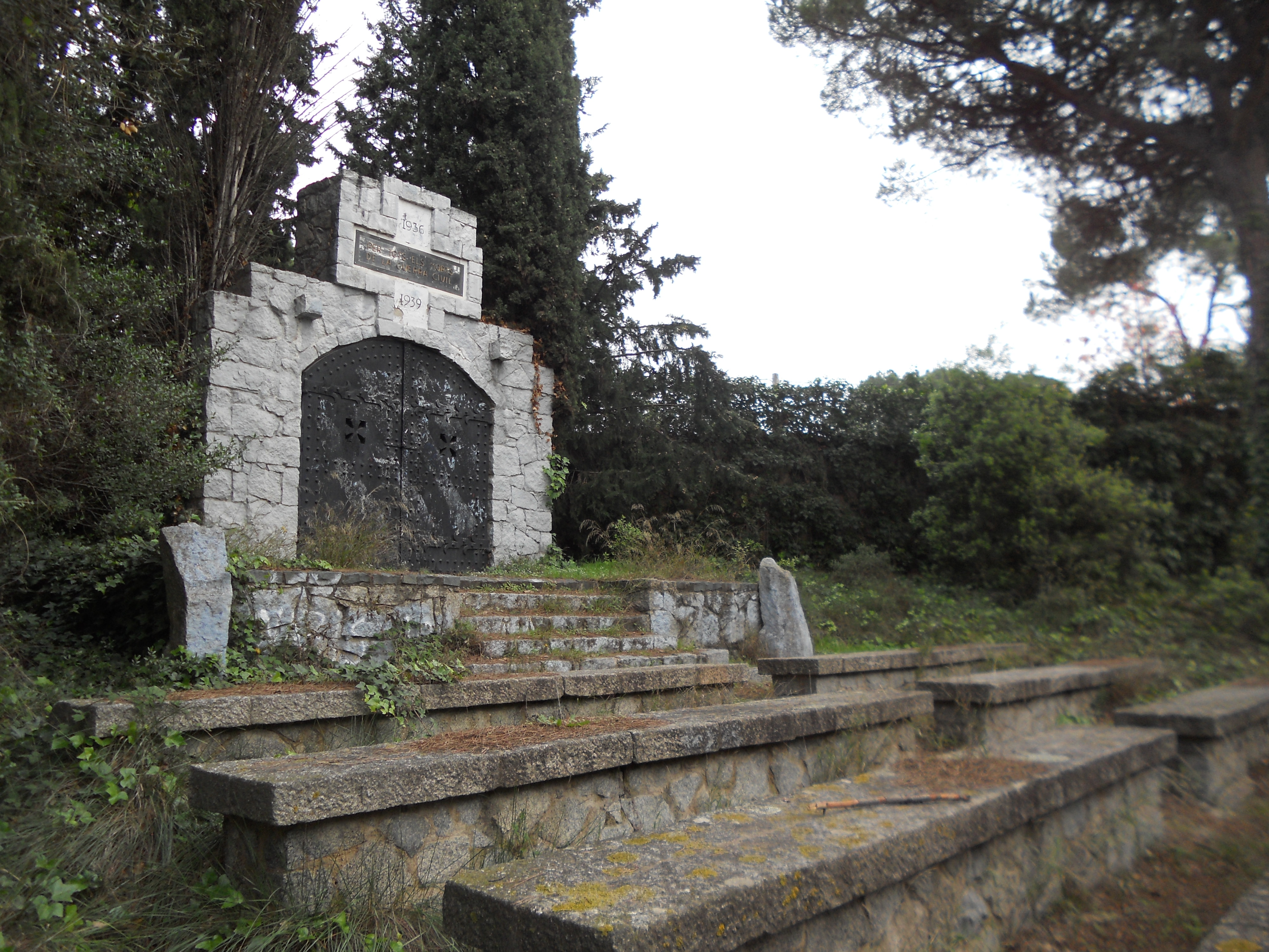 Capella del Monument als Caiguts durant la Guerra Civil espanyola, al coll de Parpers, entre Argentona i la Roca del Vallès.